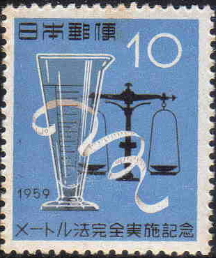 日本におけるメートル法完全実施記念切手。これ以後尺貫法による尺度の使用が制限されるようになった。